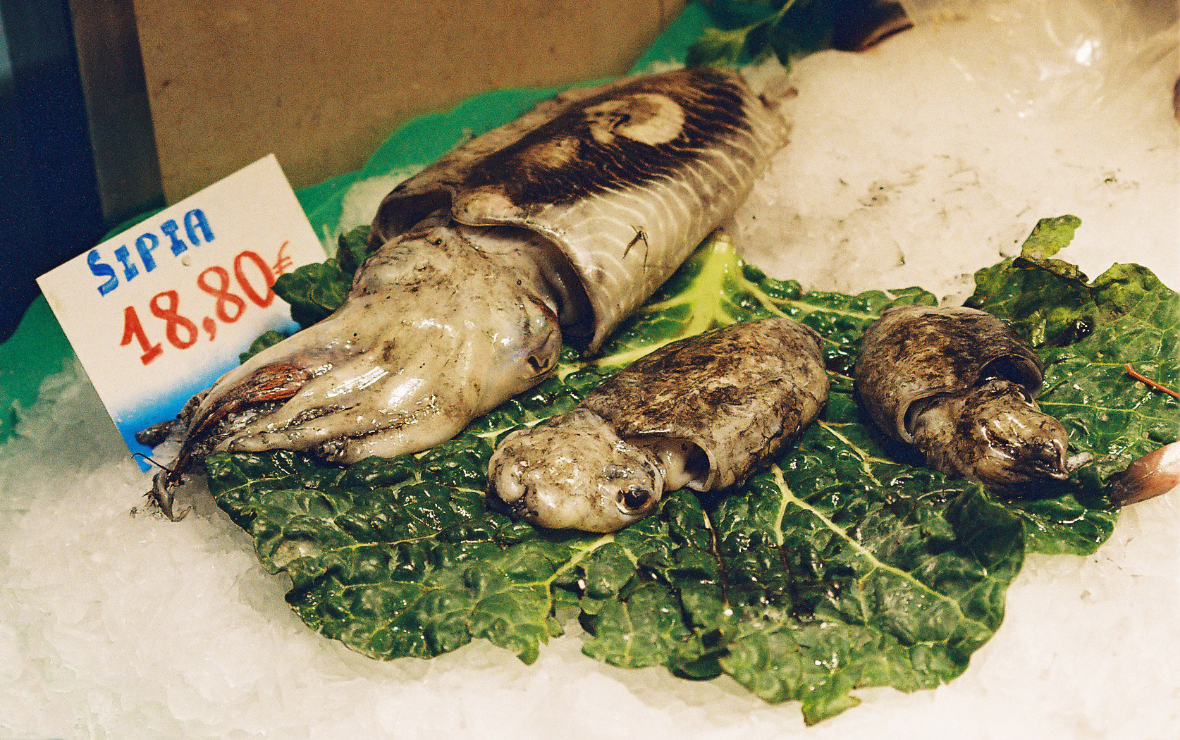 Sepia in der Boqueria Barcelona